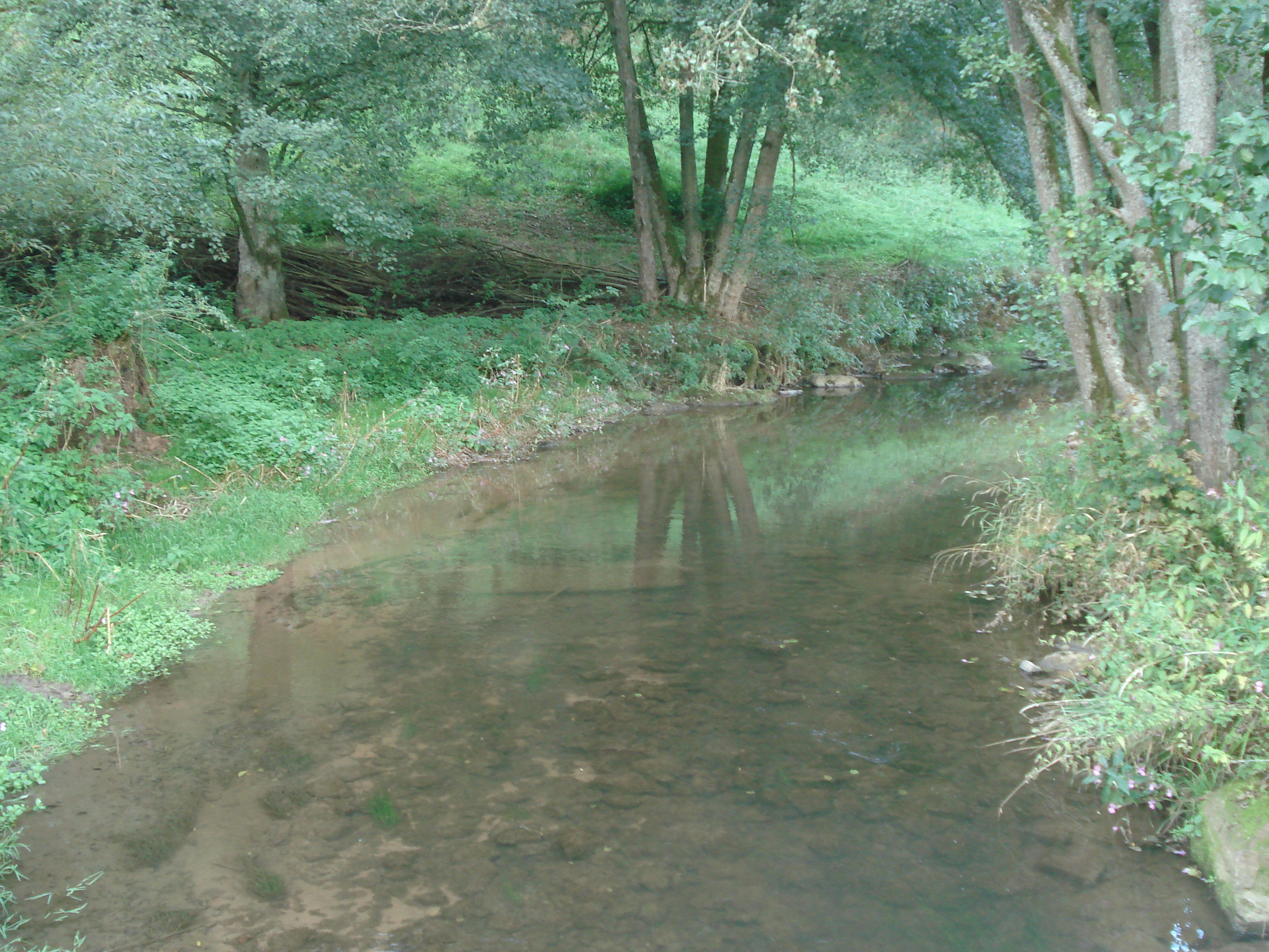 Die Morre im unteren Morretal bei Schneeberg